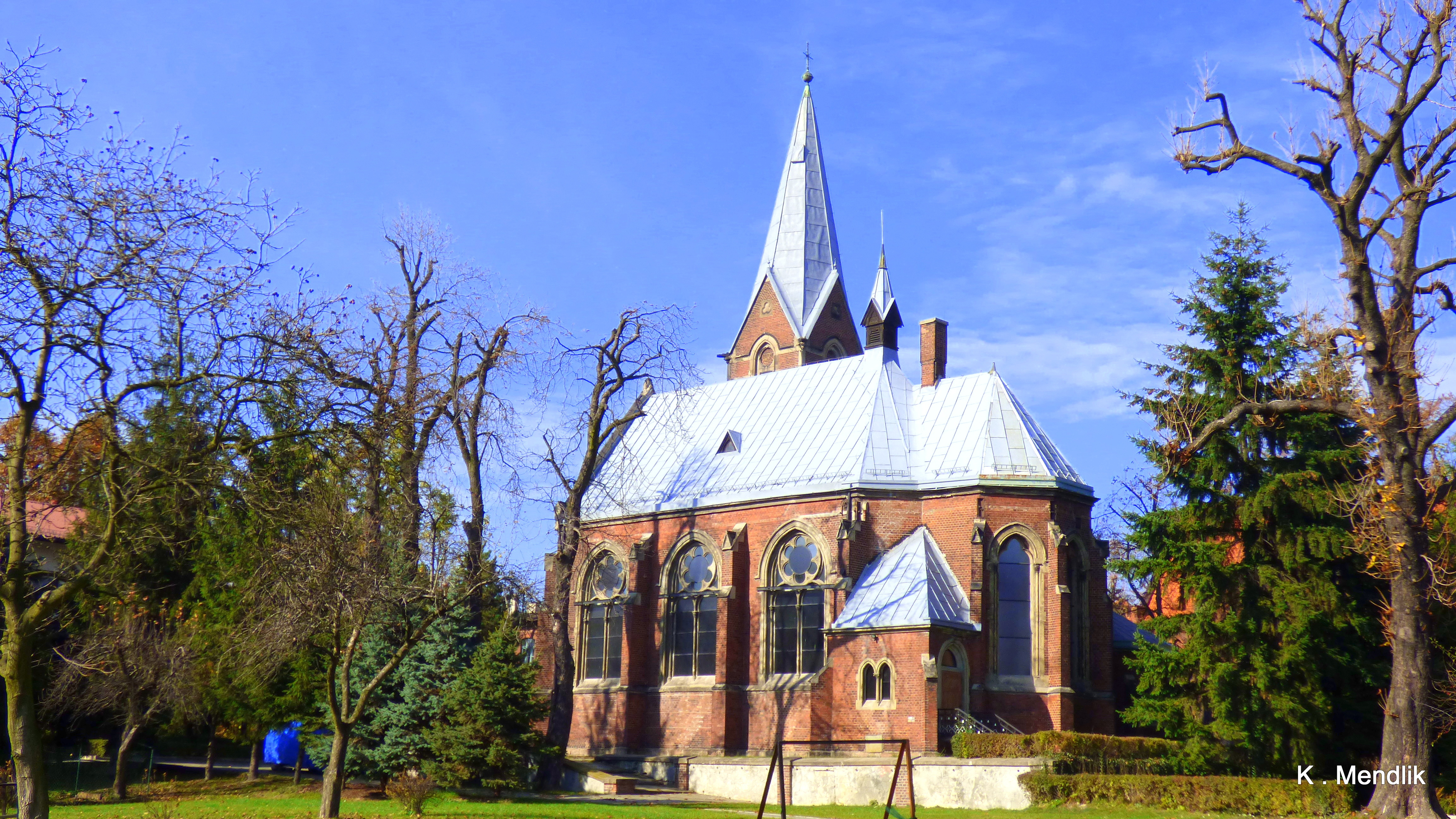 Miechowice - Kościół ewangelicko-augsburski